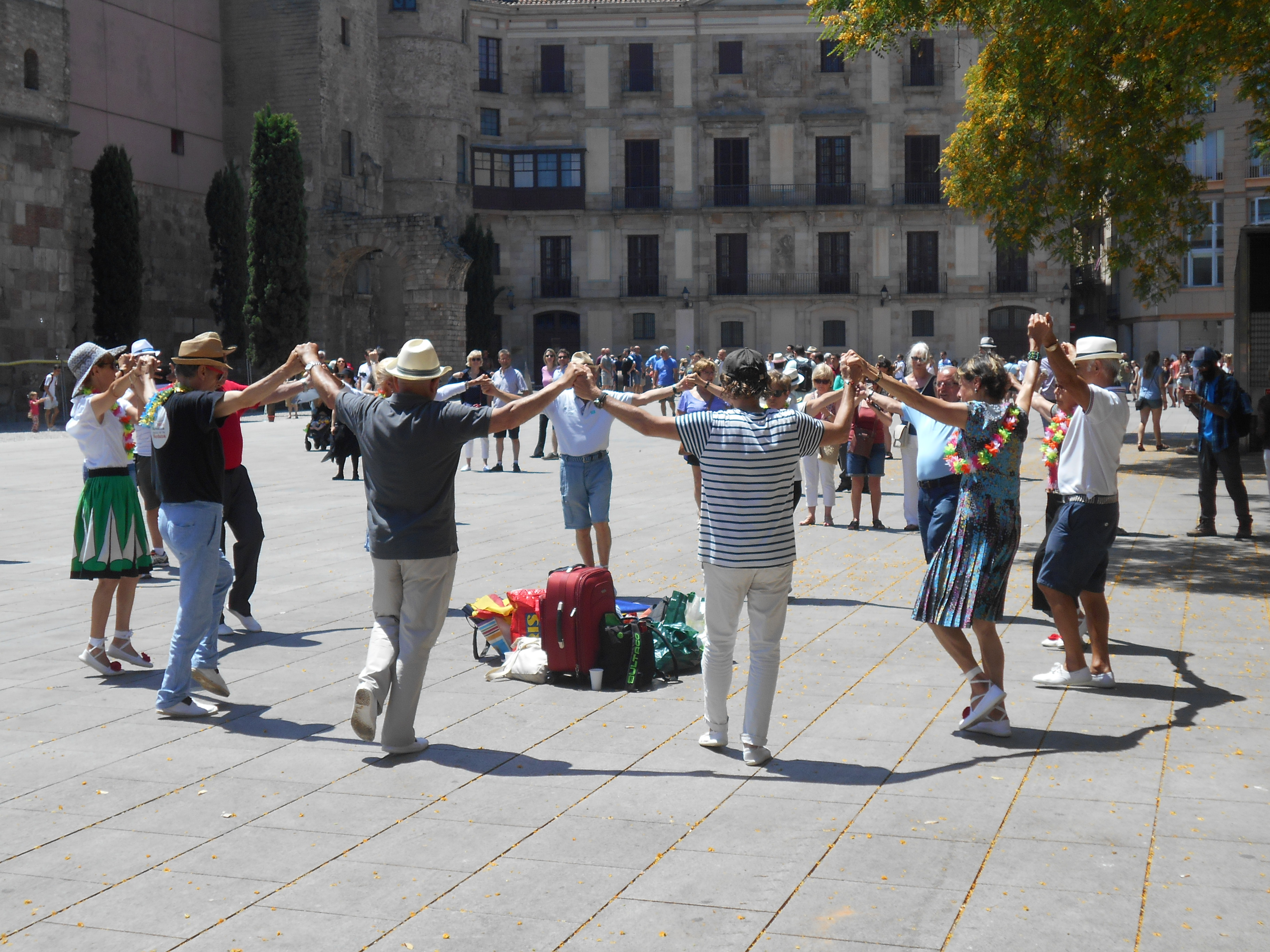 Sardana en la plaza de la Catedral, Barcelona.